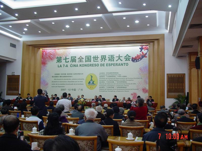 7-a Ĉina Kongreso de Esperanto. La kongreso okazis la 6-8an de decembro 2007 en Kantono. Fotita: la kongresejo.